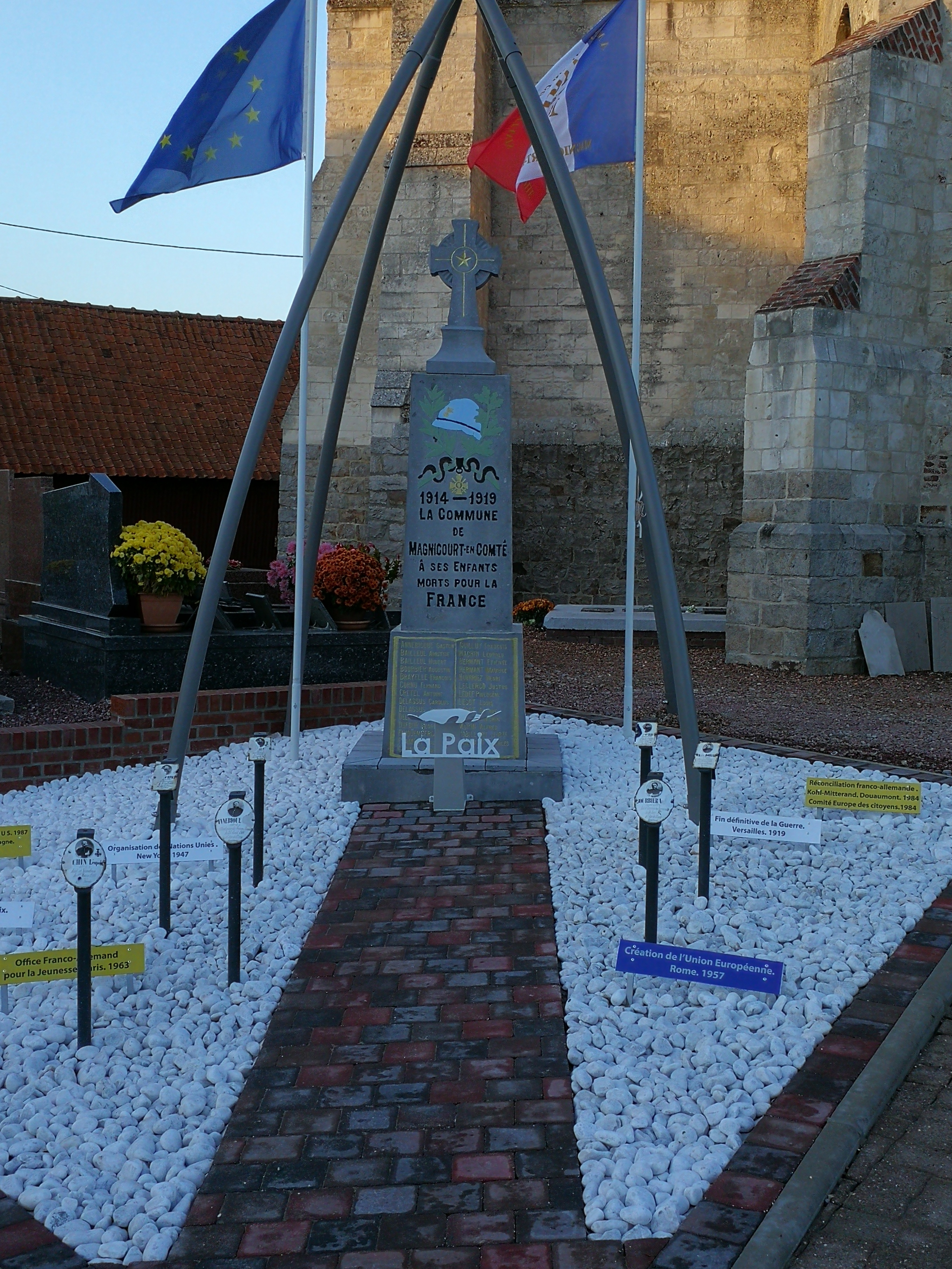 Le nouveau monument aux morts, 2018